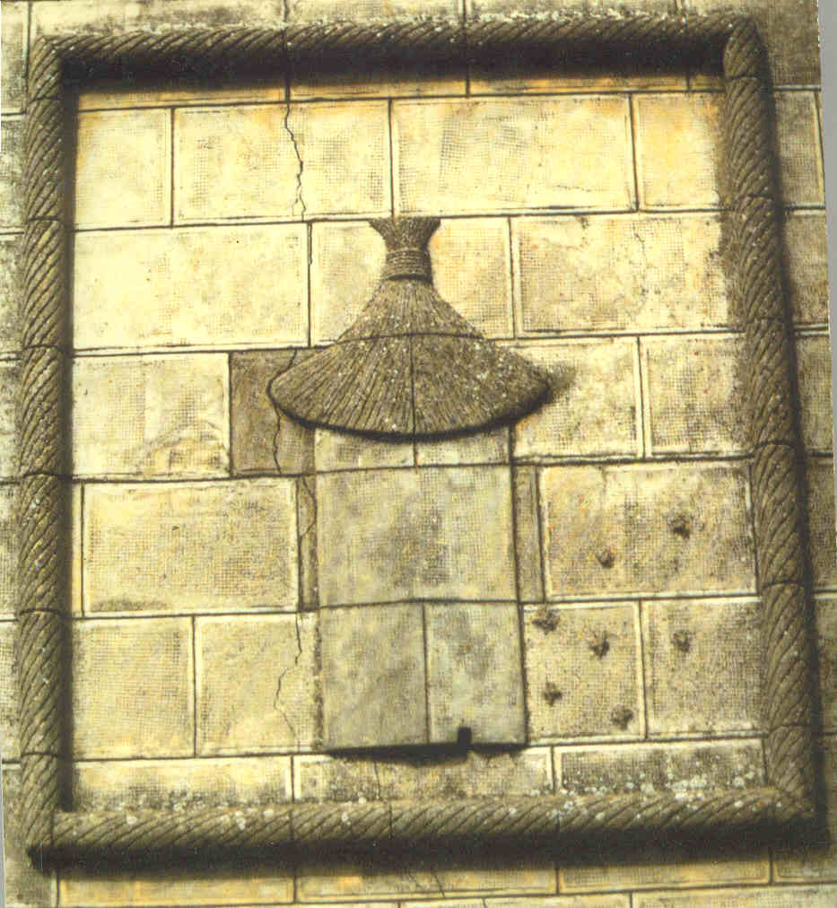 Escudo representando una colmena.